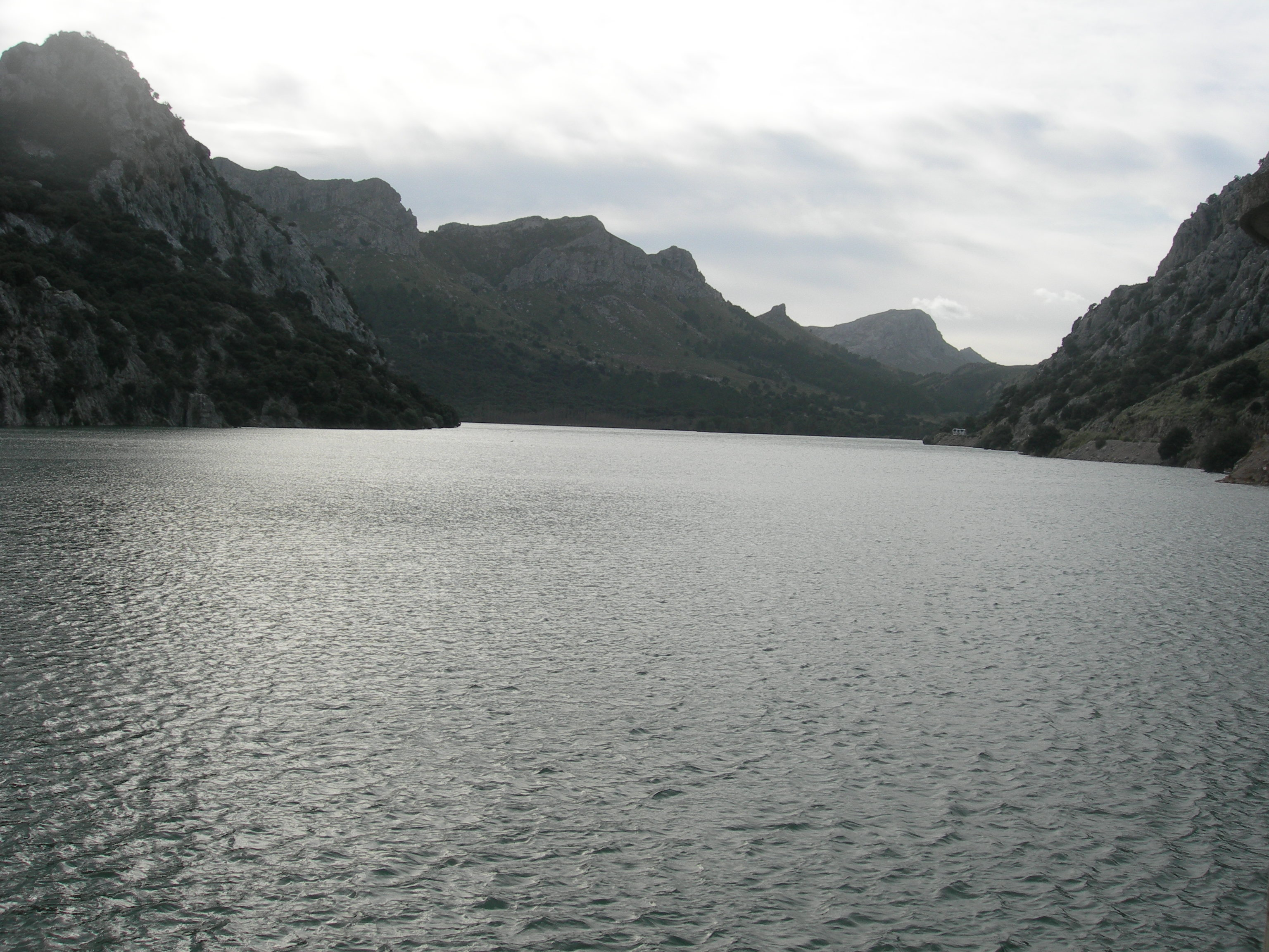 El gorg Blau (Mallorca) al 100% el día 6 de diciembre de 2008